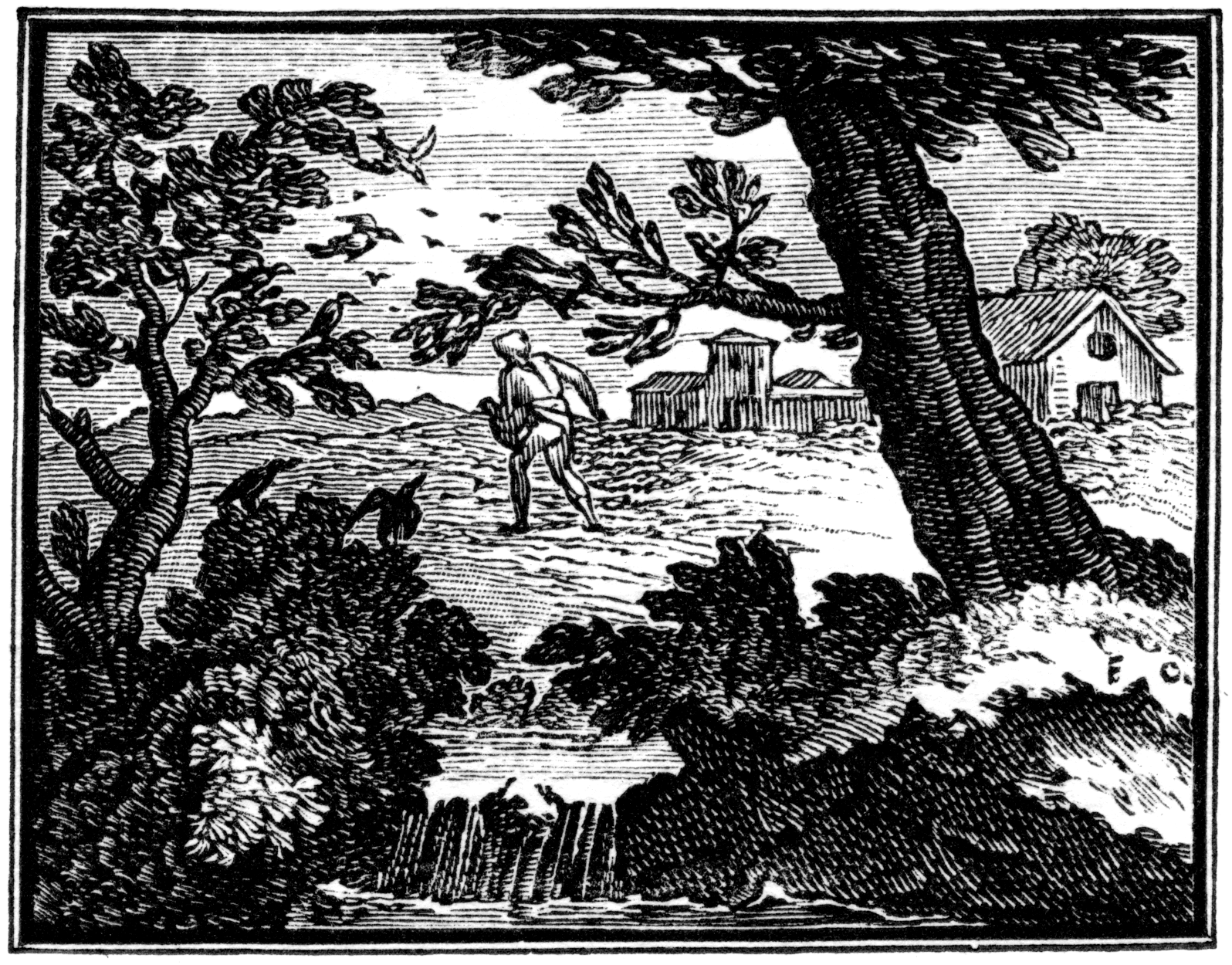 Illustrations pour les « Fables choisies mises en vers par M. de la Fontaine », Claude Barbin et Denys Thierry, Paris, 1668 (premier recueil) 1678-79 (deuxième recueil) 1694 (troisième recueil). Numérotation Charpentier (1705).